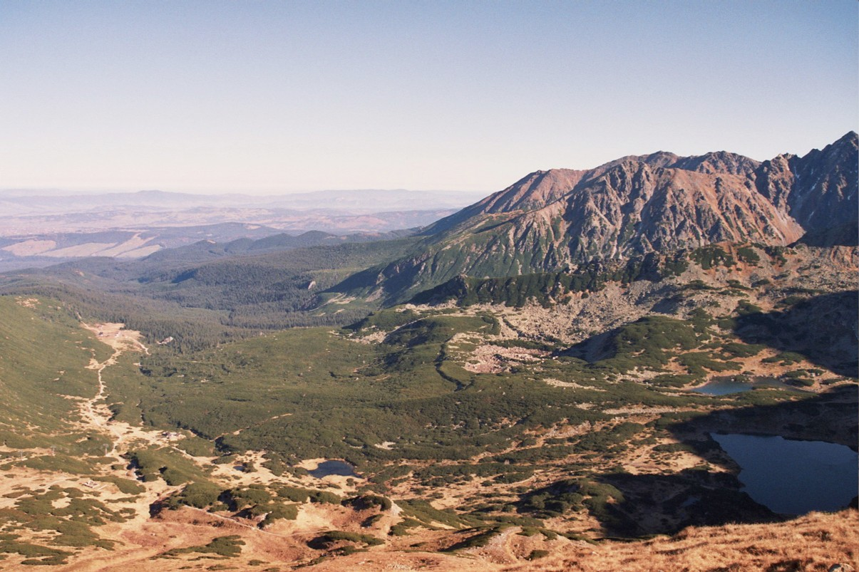 Hala Gąsienicowa widziana z okolic przełęczy Liliowe. Na zdjęciu widać: Zielony Staw, z lewej strony Sucha Dolina Stawiańska, w centrum Roztoka Stawiańska, z prawej grzbiet Kościelca.